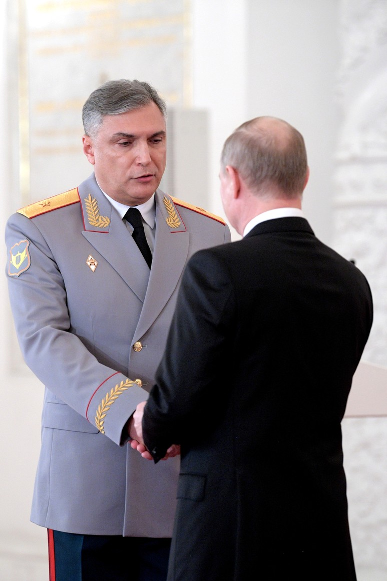 Встреча Президента России Владимира Путина с военнослужащими, участвовавшими в антитеррористической операции в Сирии. Генерал-майору Александру Матовникову присвоено звание Героя Российской Федерации